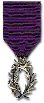 Revers Officier des Palmes Académique